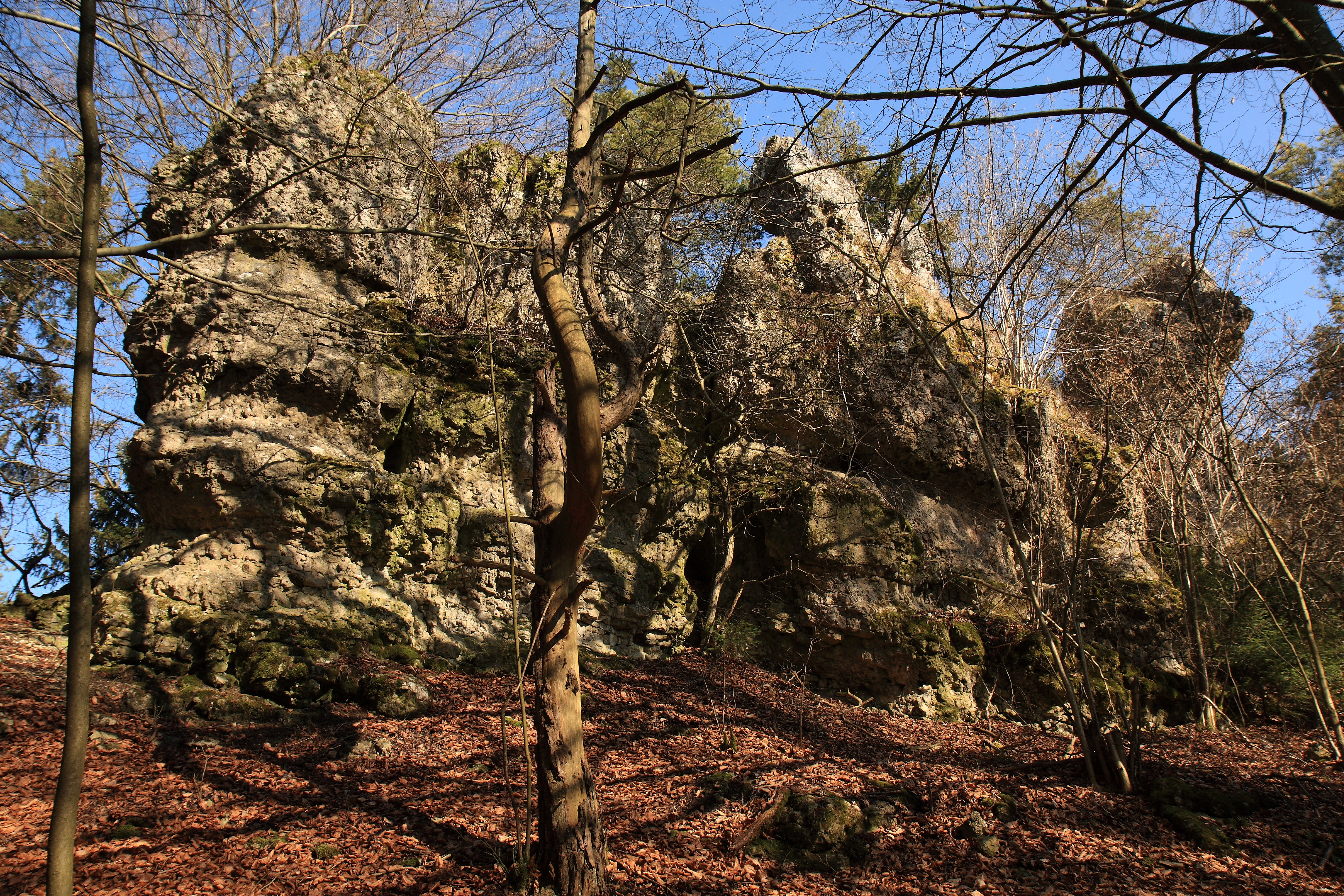 Burgstall Alte Bürg - Das Felsriff, um dass die Burganlage errichtet wurde